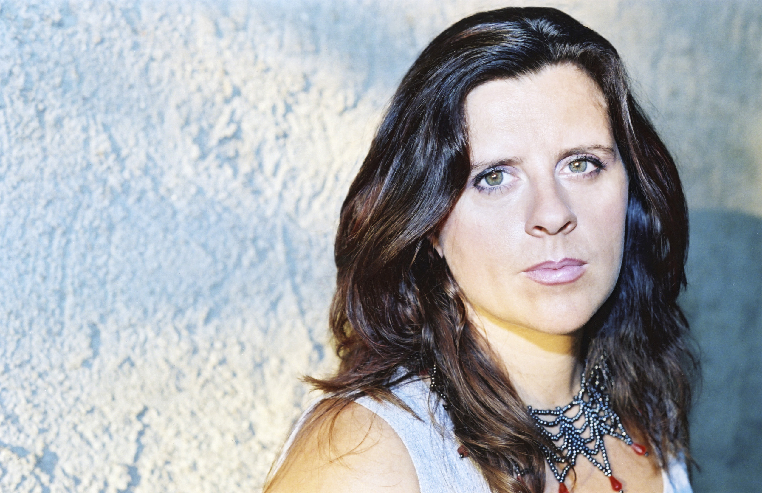 Fotografie spisovatelky Zuzany Maléřové.